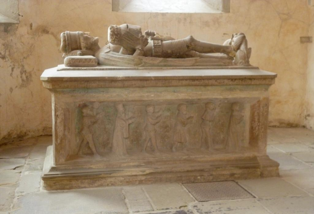 Grabtumba Gebhards XIV. von Querfurt in der Burgkirche der Burg Querfurt